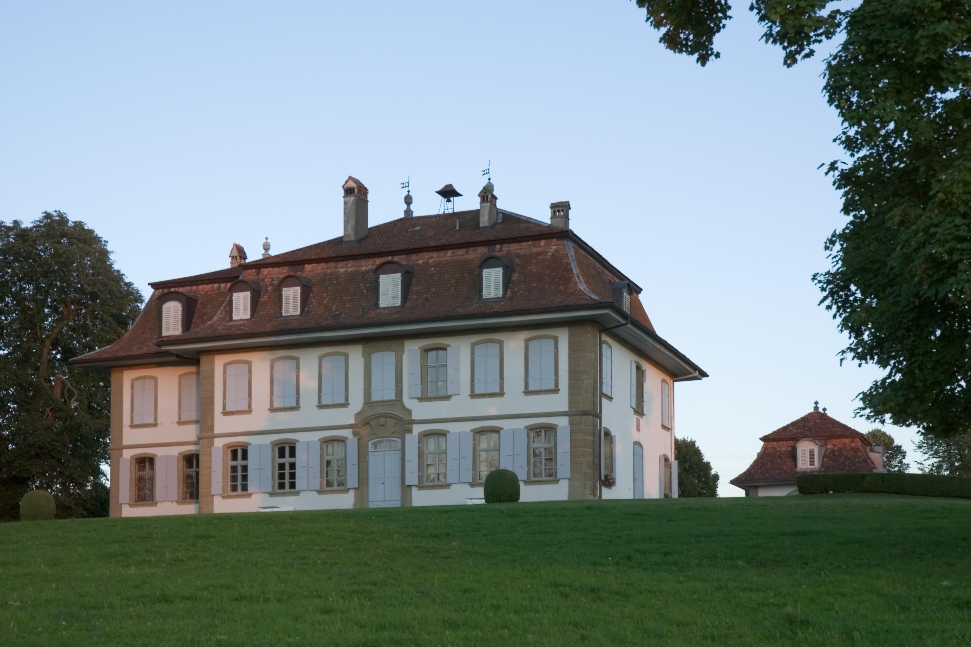 Herrschaftshaus in Vogelshus, Gemeinde Bösingen, Schweiz